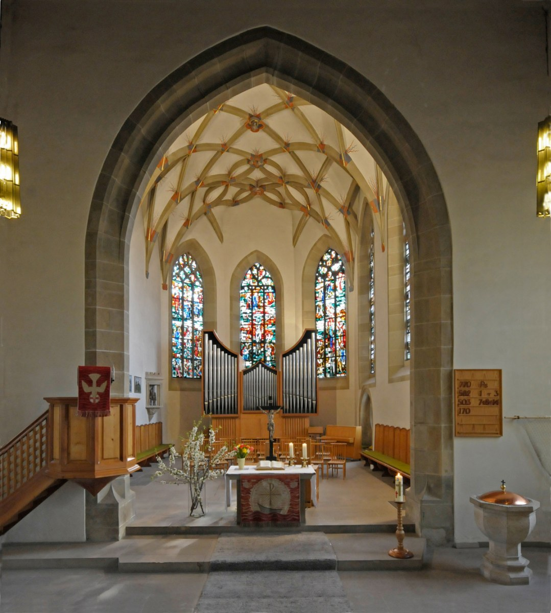 Innenansicht der Evang. Martinskirche Kornwestheim